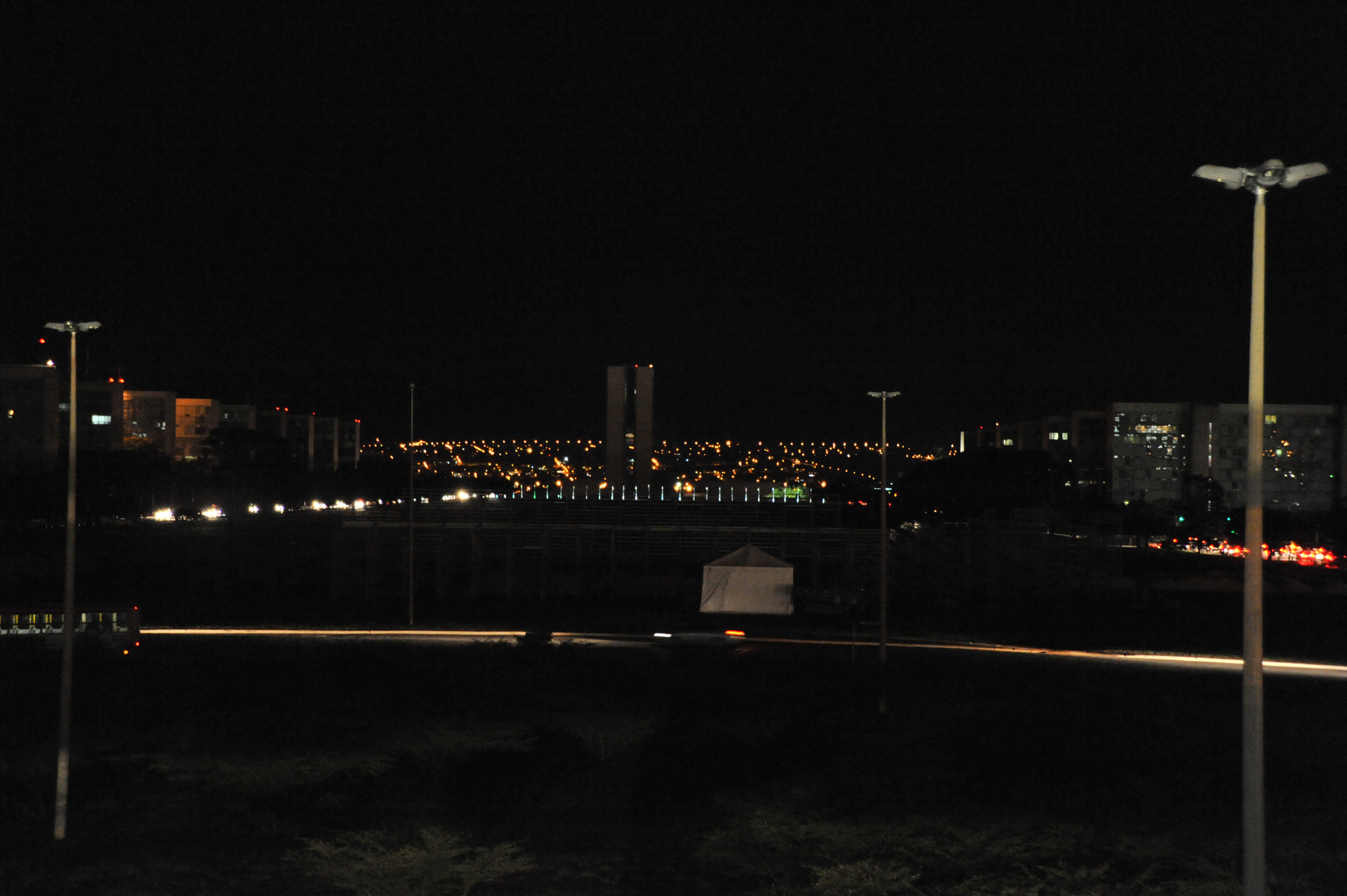 O Brasil foi um dos 84 países que aderiram à Hora do Planeta, movimento coordenado pela organização não-governamental WWF, em alerta às conseqüências das mudanças climáticas e do aquecimento global. Na capital, o principal monumento da cidade, a Esplanada dos Ministérios - que inclui, ainda, a Catedral, o Palácio do Planalto, o Supremo Tribunal Federal e o Congresso Nacional - ficou totalmente sem iluminação por uma hora